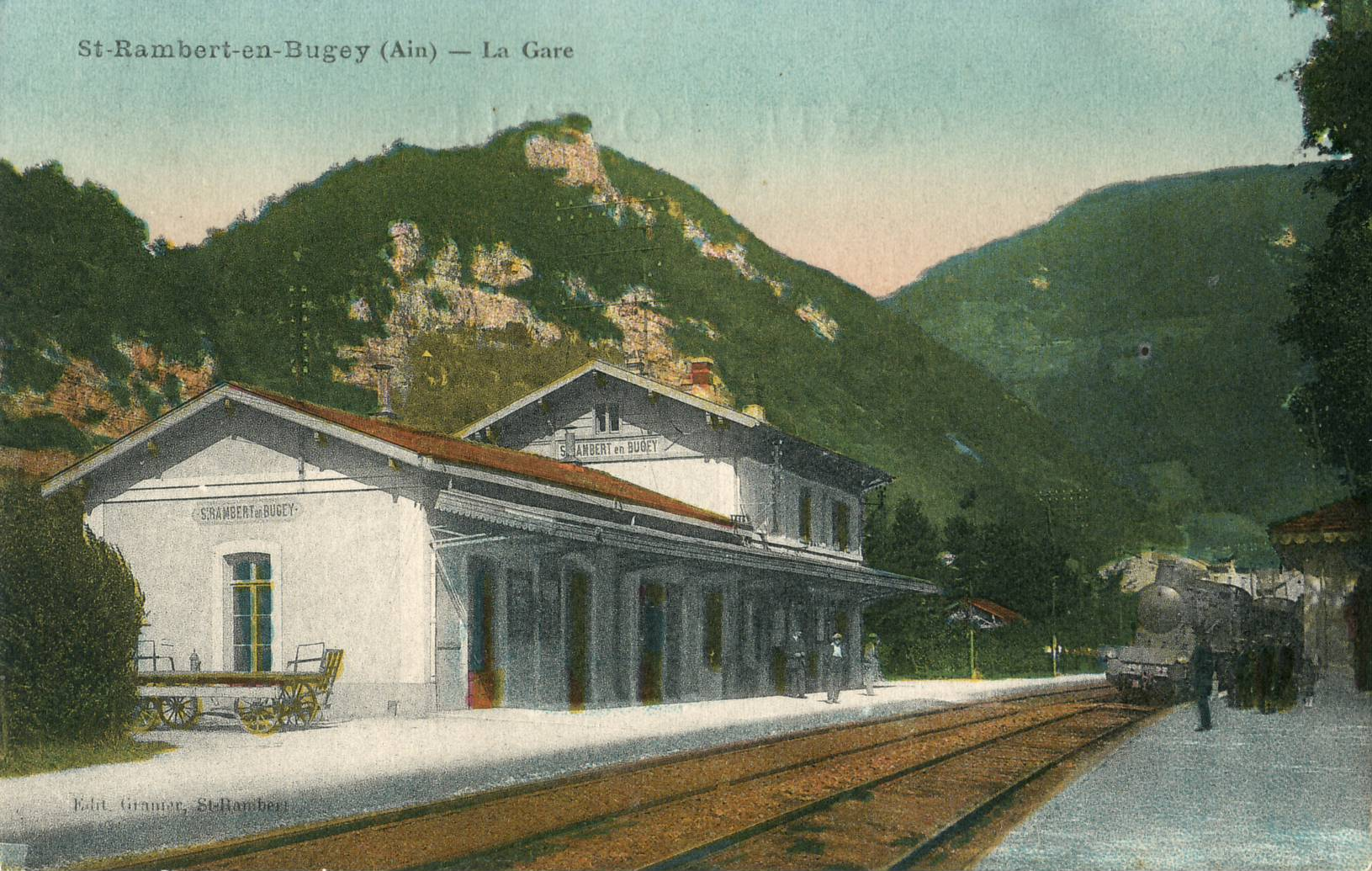 Carte postale ancienne éditée par : SAINT-RAMBERT-EN-BUGEY - La Gare.